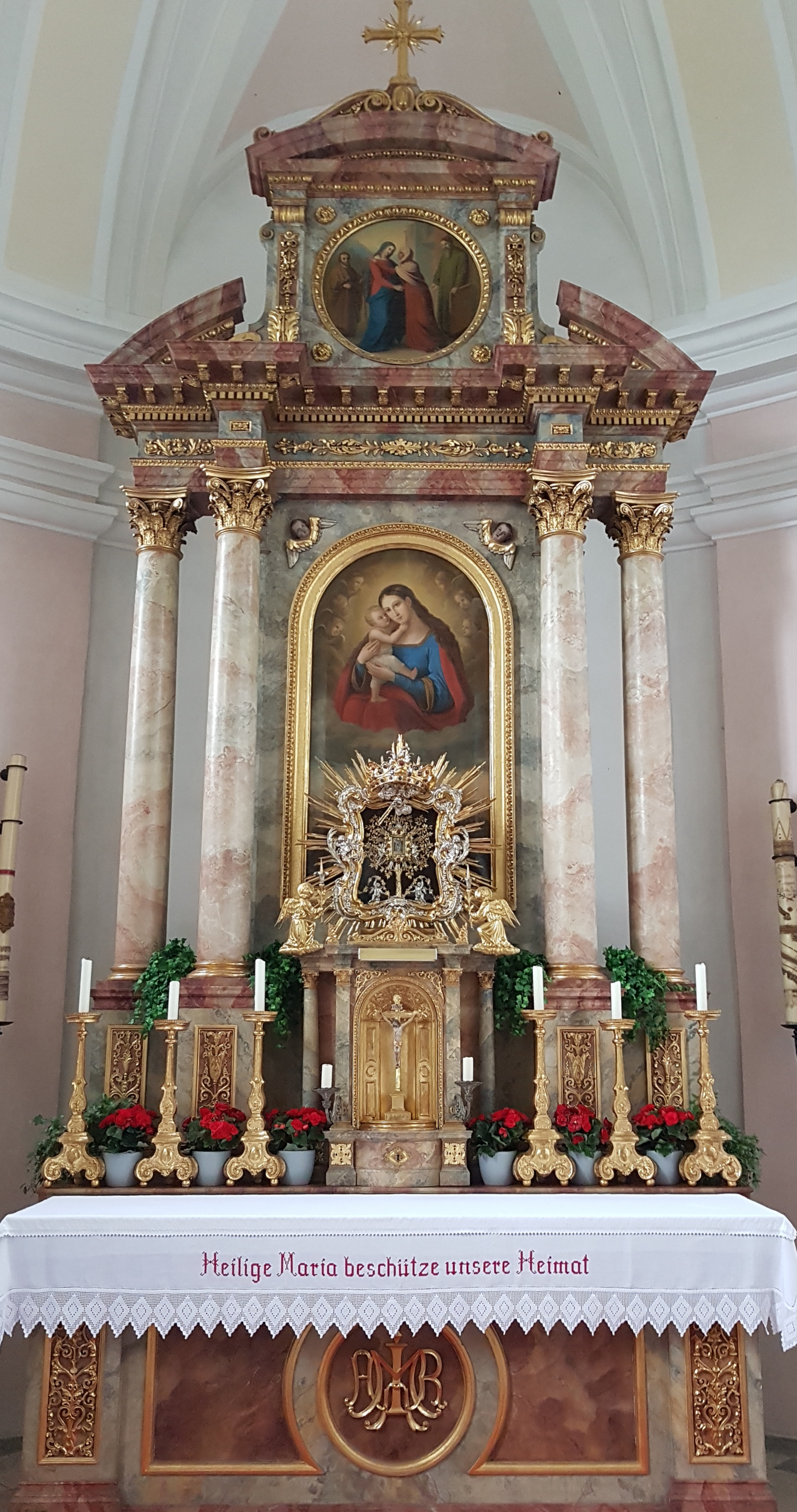 Mariä Heimsuchung (Mühlberg, Waging am See), Hochaltar